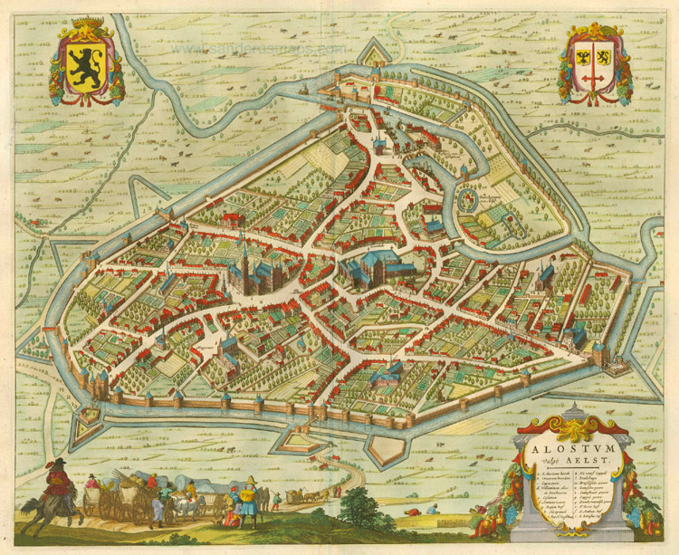 Titel:Alostum Vulgo Aelst